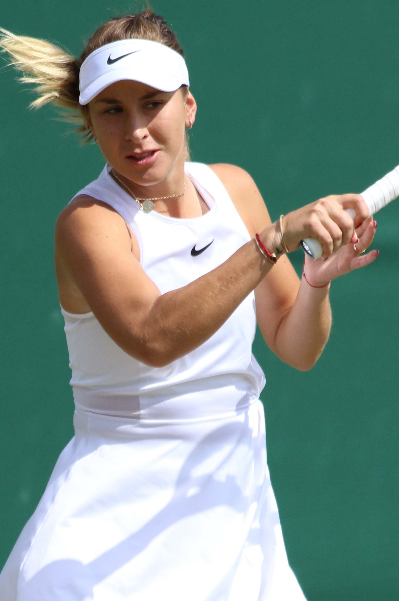 Bencic WM19 (6)